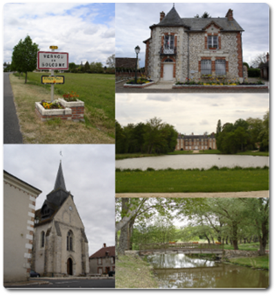 photos de la commune de vernou en sologne